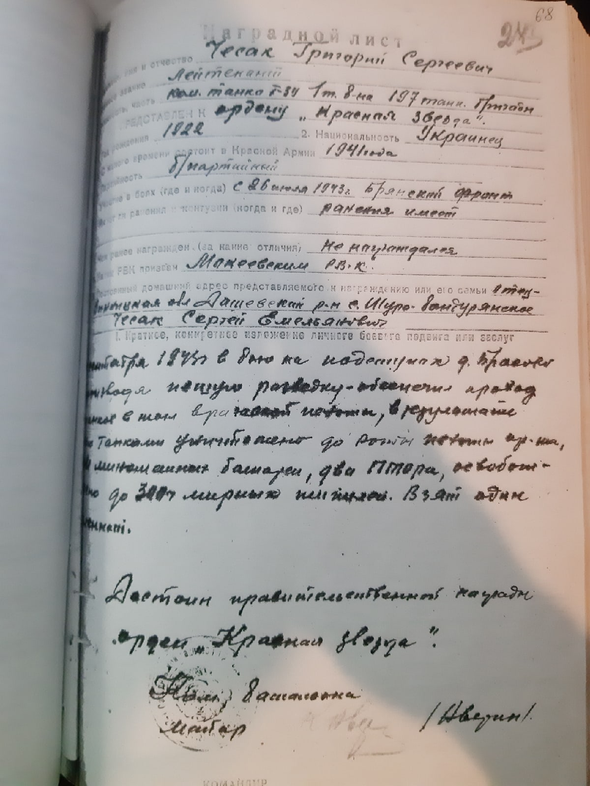 Наградной лист на орден красной звезды Чесака Григория Сергеевича